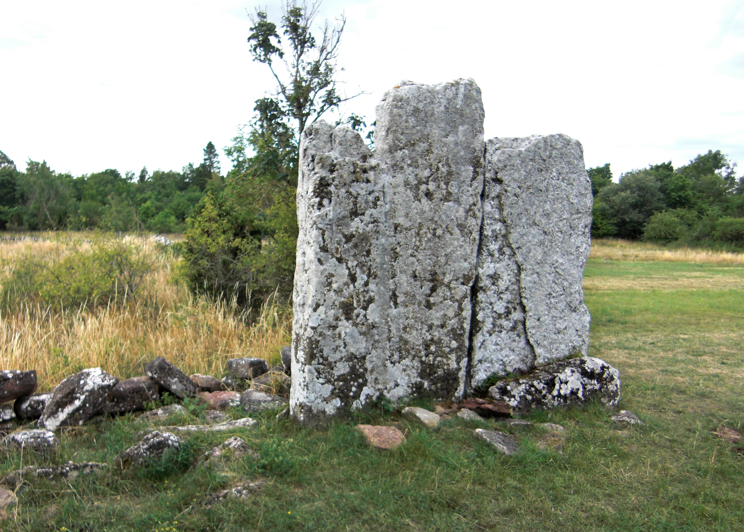 Odens flisor (Raä-nr Gärdslösa 172:3) i Gärdslösa socken, Öland, Kalmars län, Sverige.